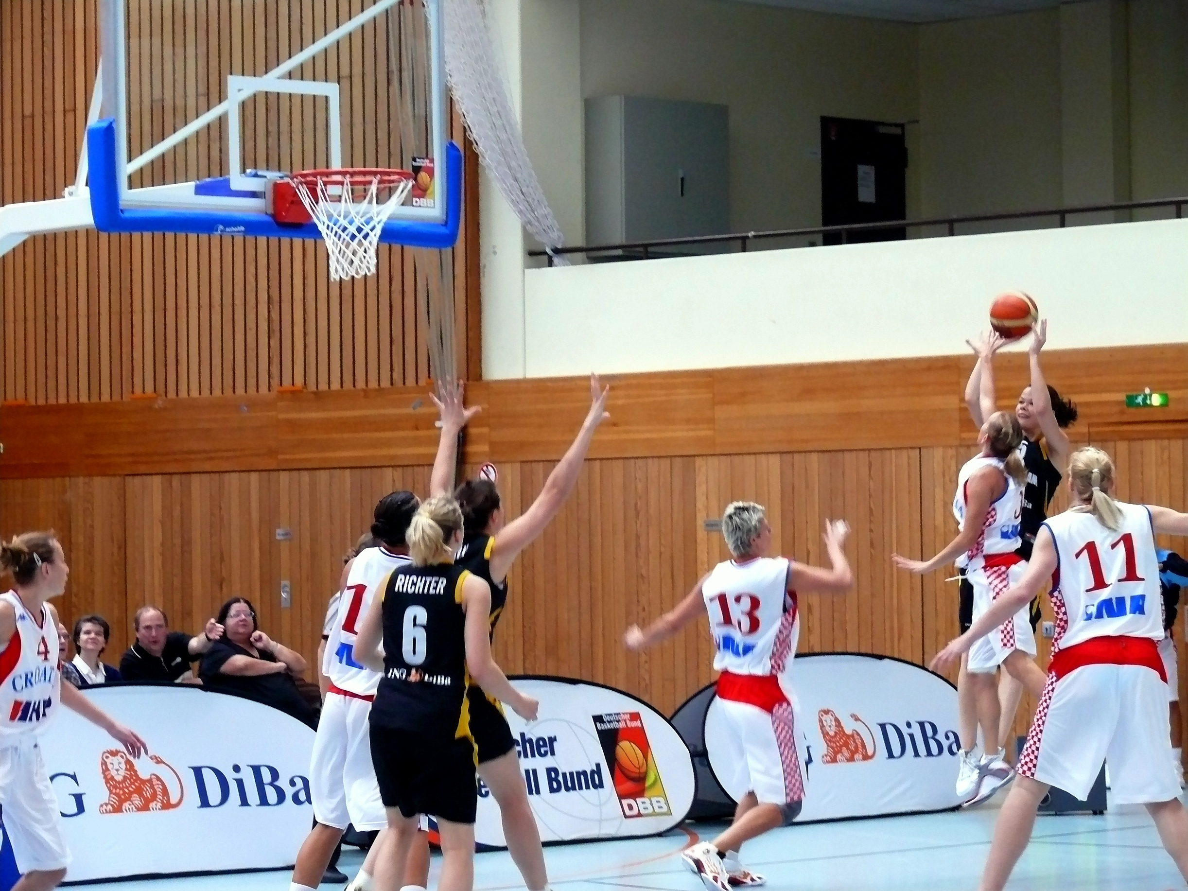 Nationalspielerin Anne Breitreiner beim Wurf